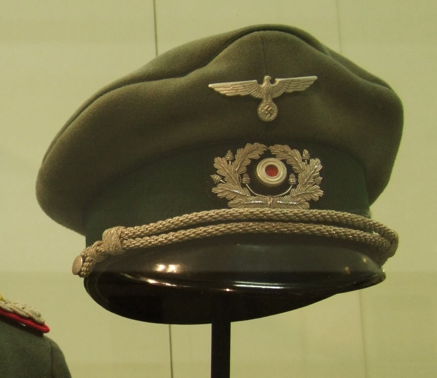 ドイツ国防軍陸軍の制帽